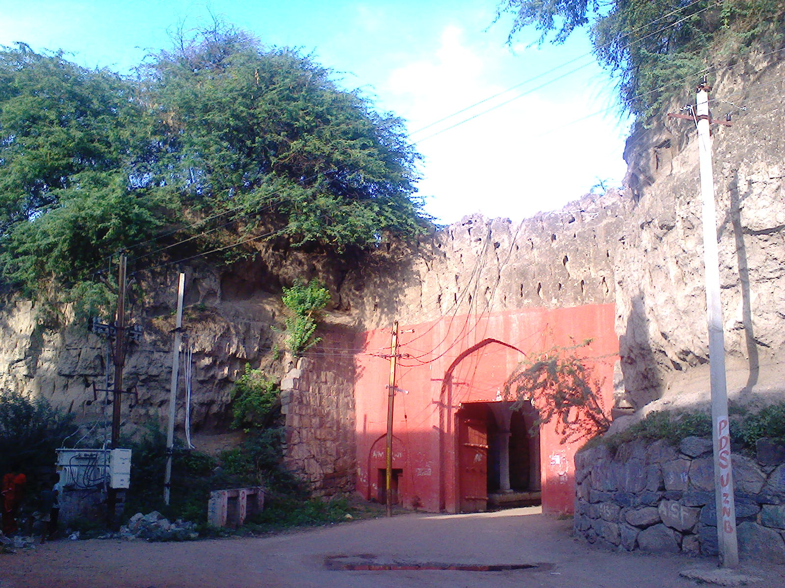 కోట ప్రవేశ ద్వారం